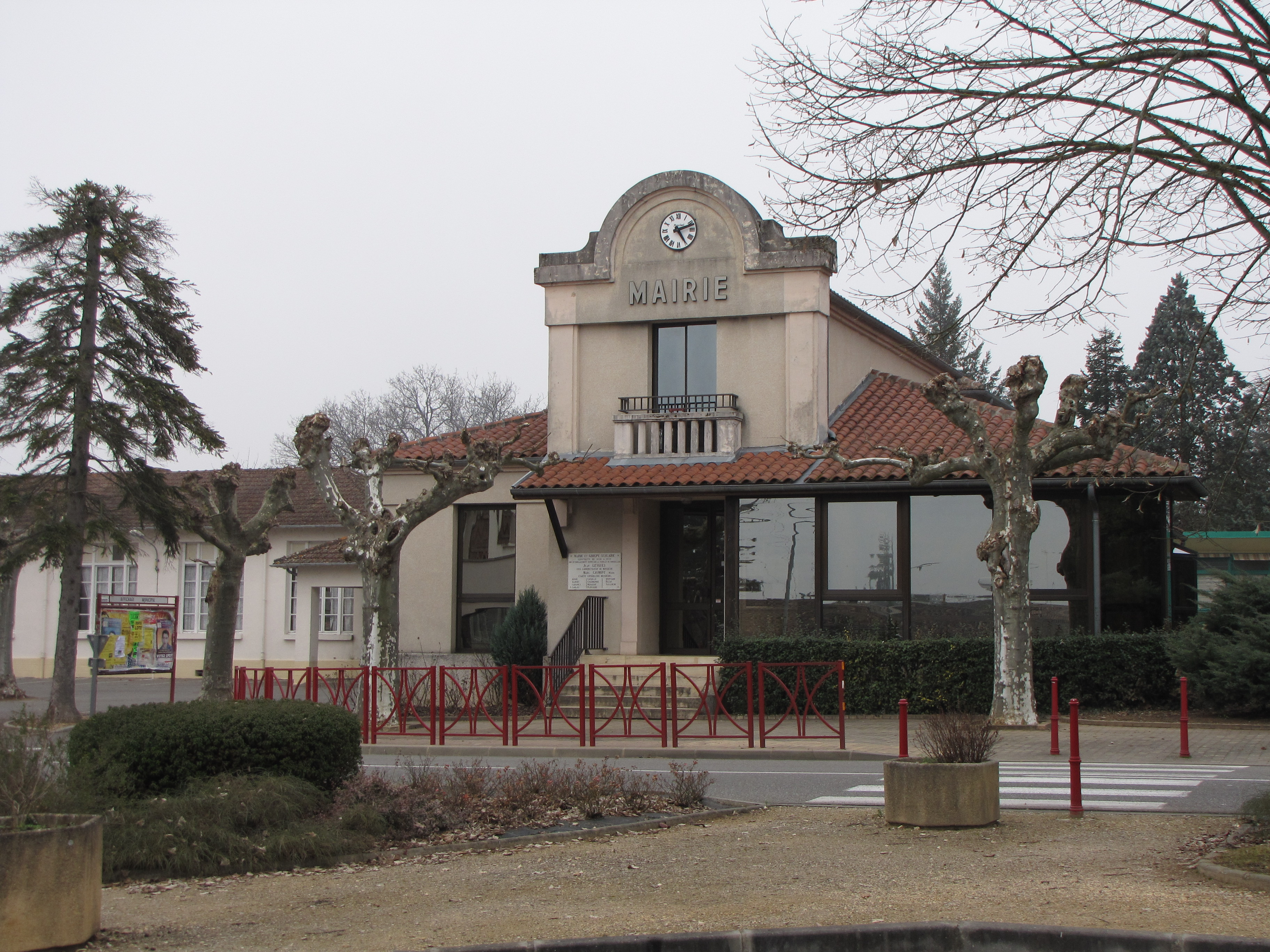 Mairie de Montayral